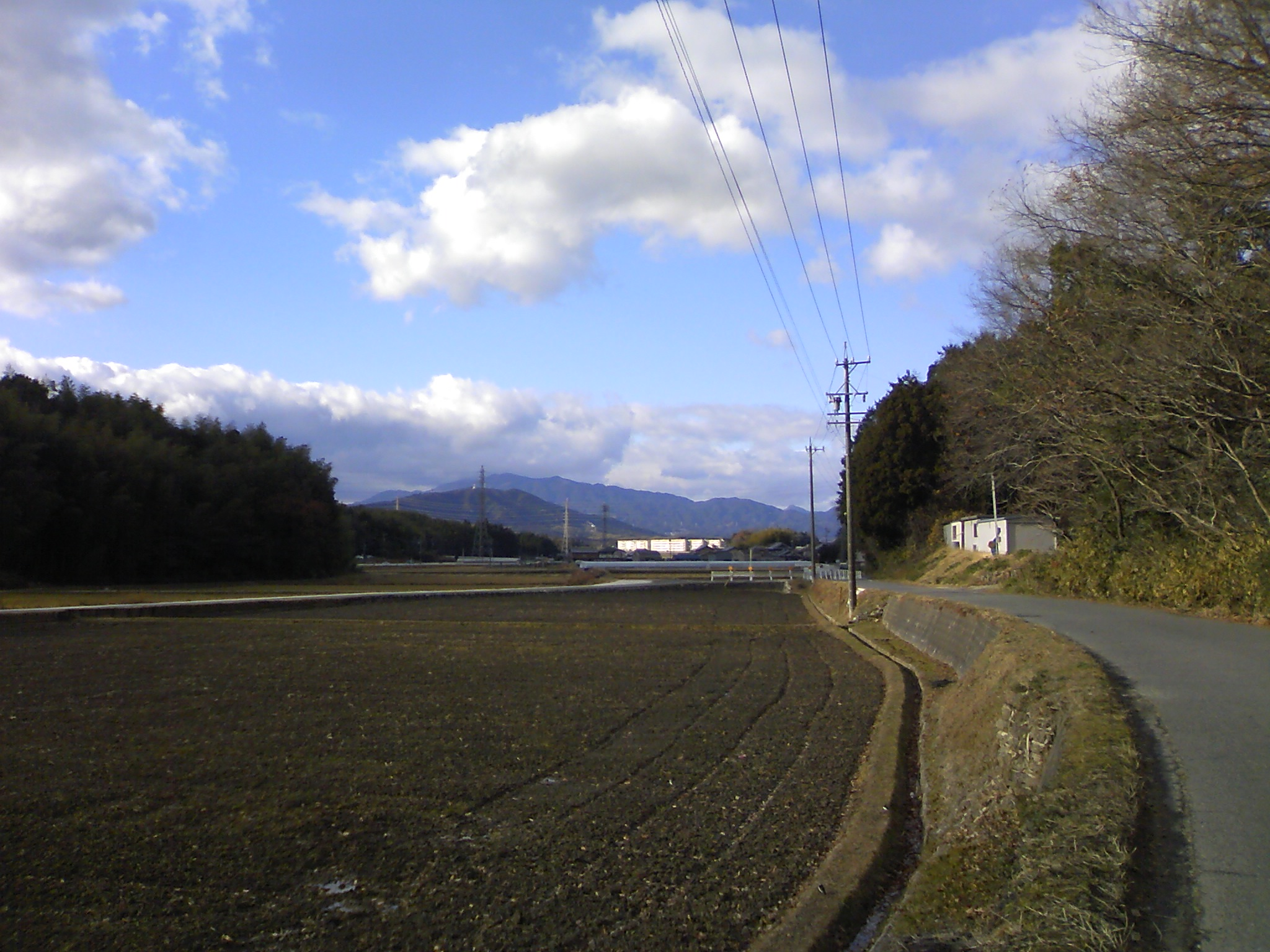 津市半田の西部。水田風景。